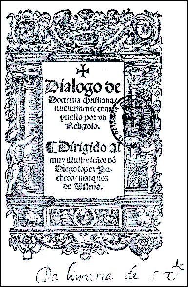 Dialogo de doctrina christiana, 1529